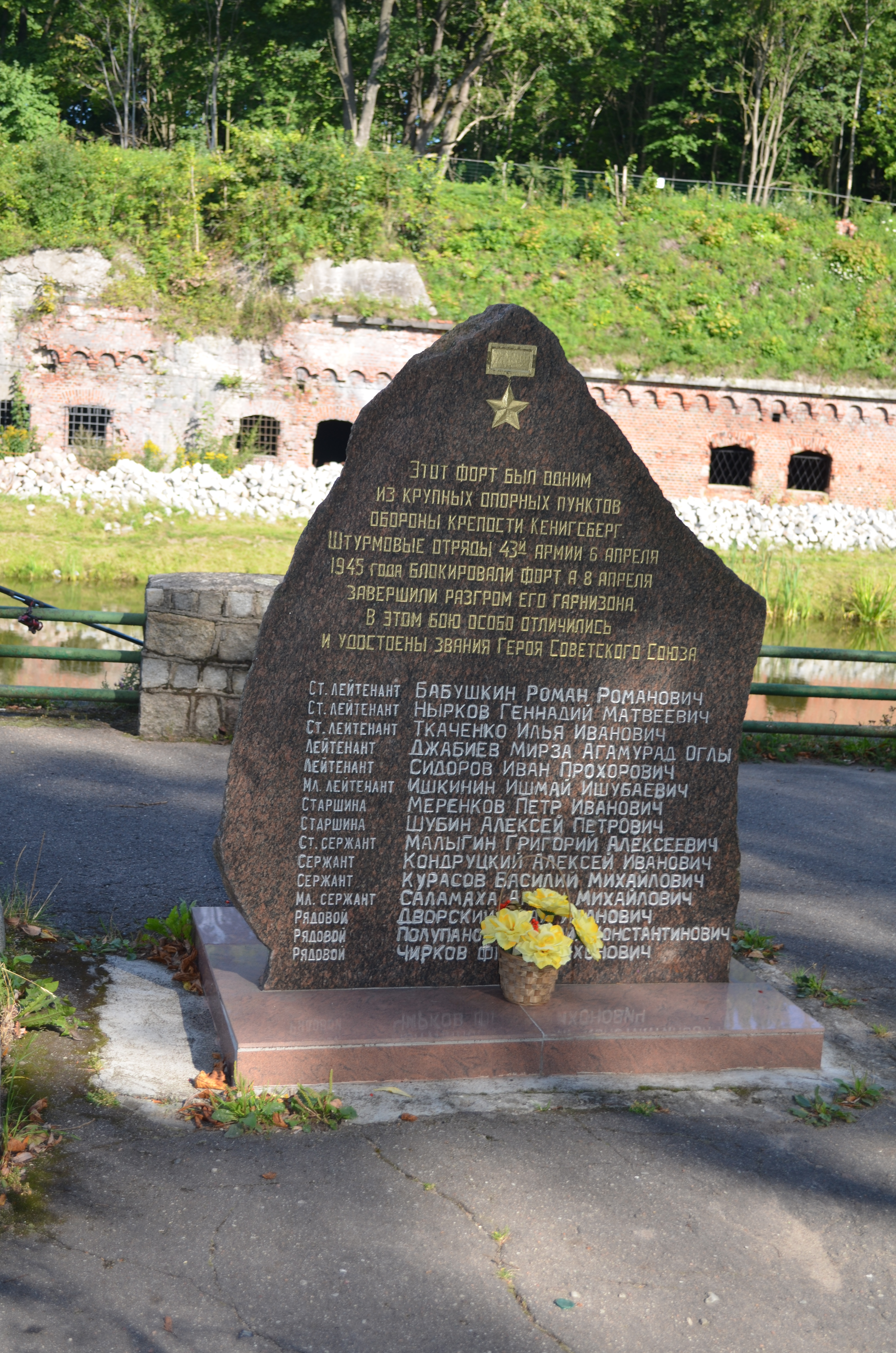 Форт N 5, при взятии которого в апреле 1945 г. отличились и были удостоены звания Героя Советского Союза 15 воинов 43 армии 3 Белорусского фронта (Калиниградская область, Калининград, Советский пр., Светлогорское шоссе)